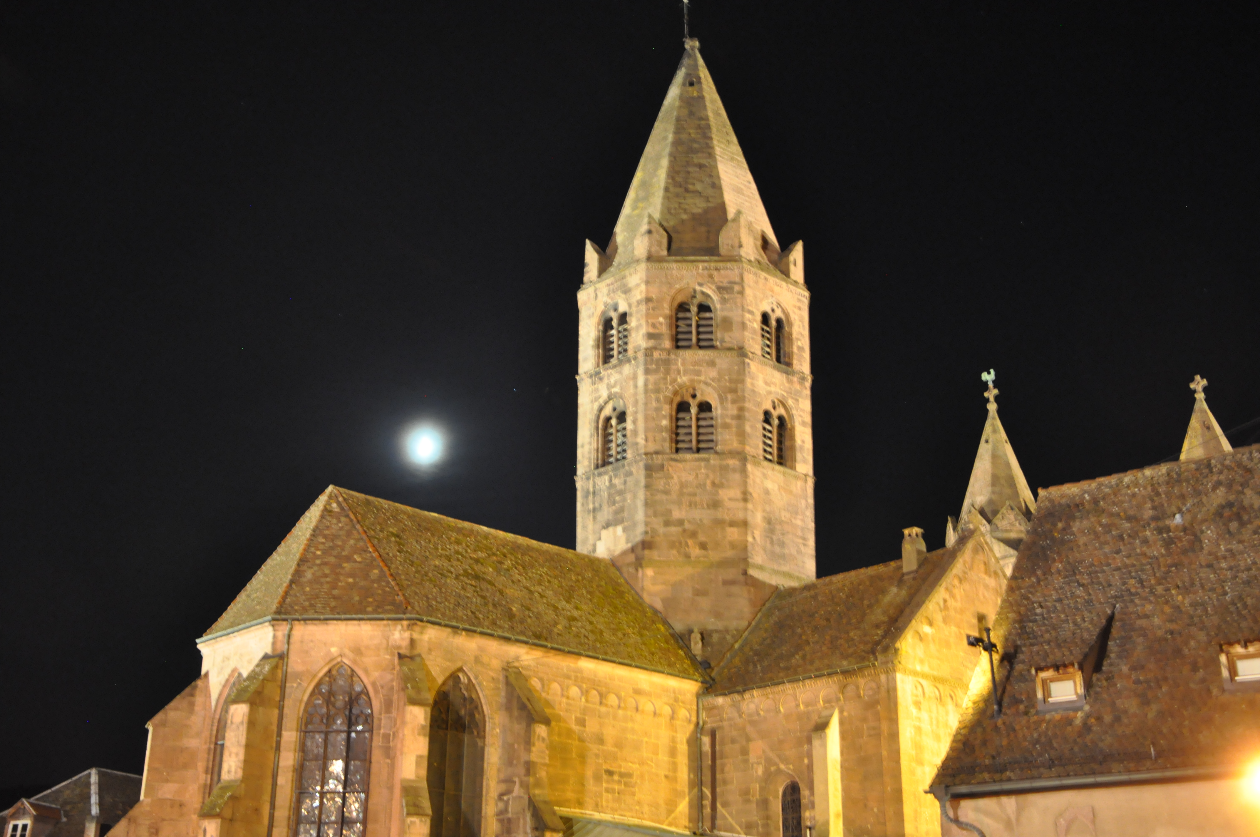 L'église Saint Léger datant du XIIème siècle et de style art roman tardif.